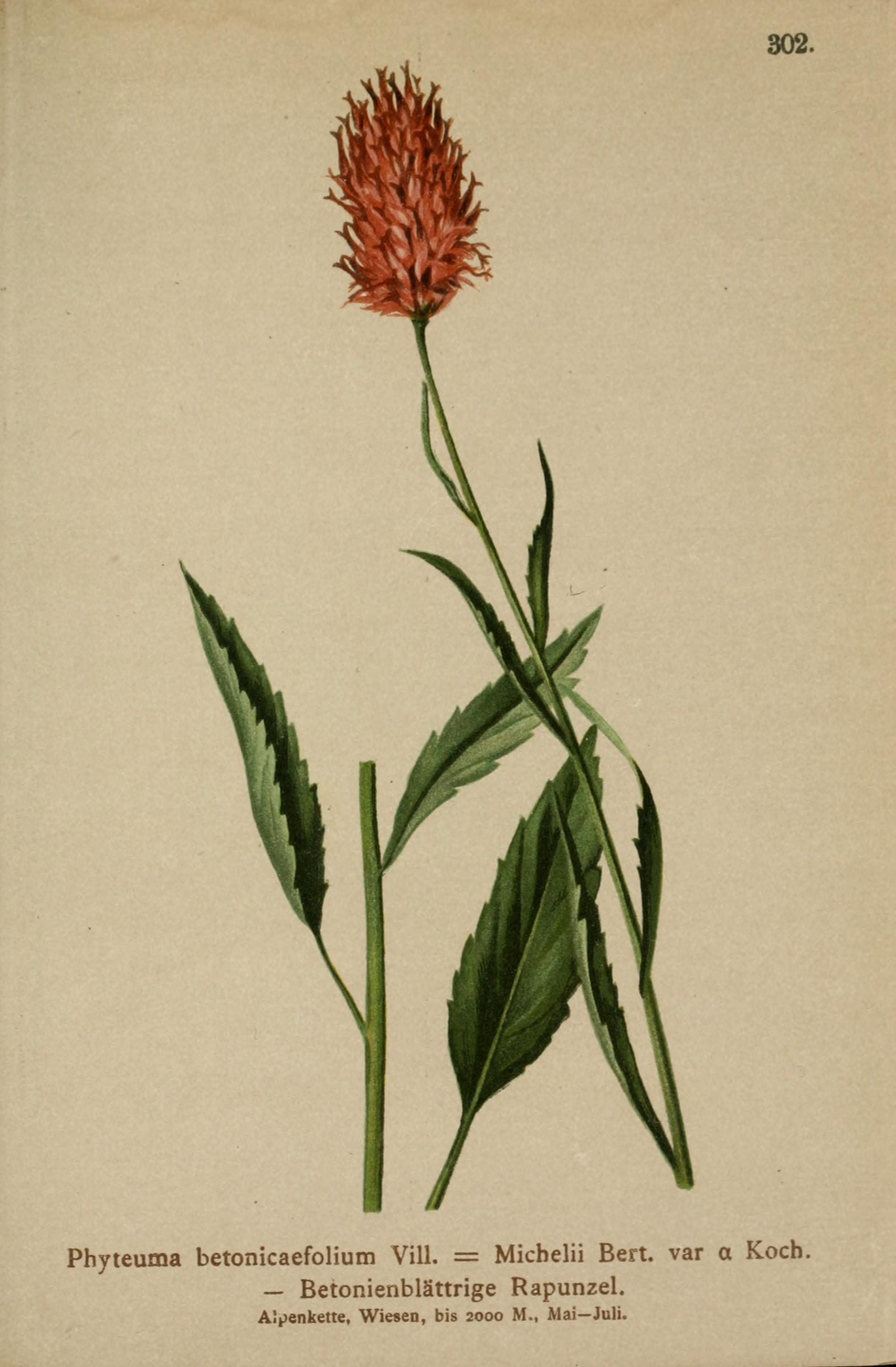 Atlas der Alpenflora / herausgegeben vom Deutschen und Oesterreichischen Alpenverein ; nach der Natur gemalt von Anton Hartinger ; mit Text von K.W. v. Dalla Torre.